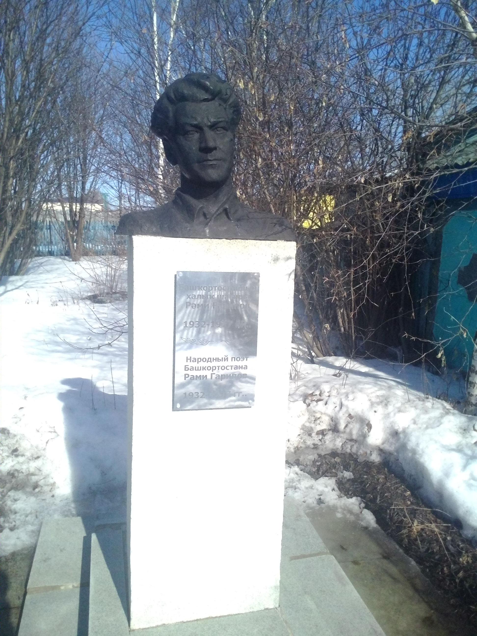 Погруддя Рамі Гаріпова біля музею